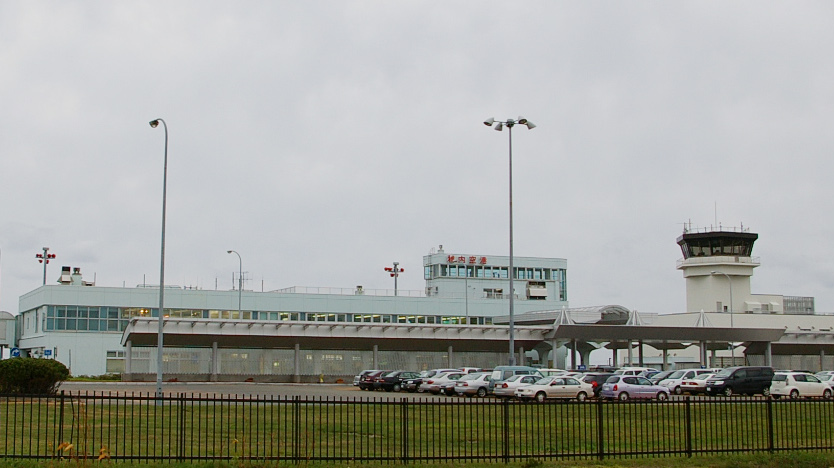 Wakkanai Airport.